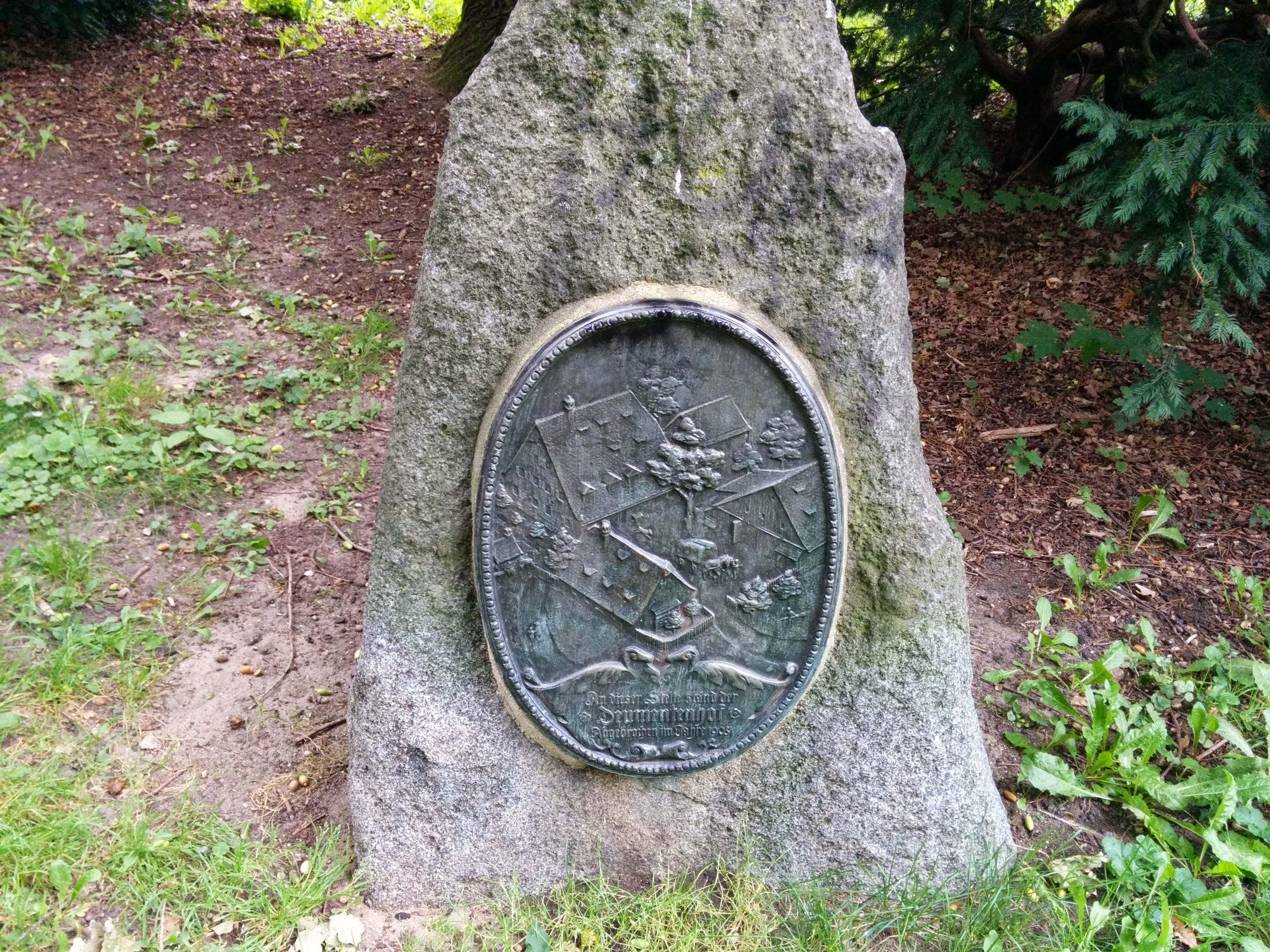 Granitstein mit ovaler Bronzeplakette, 1905; im nordöstlichen Teil des Stadtparks